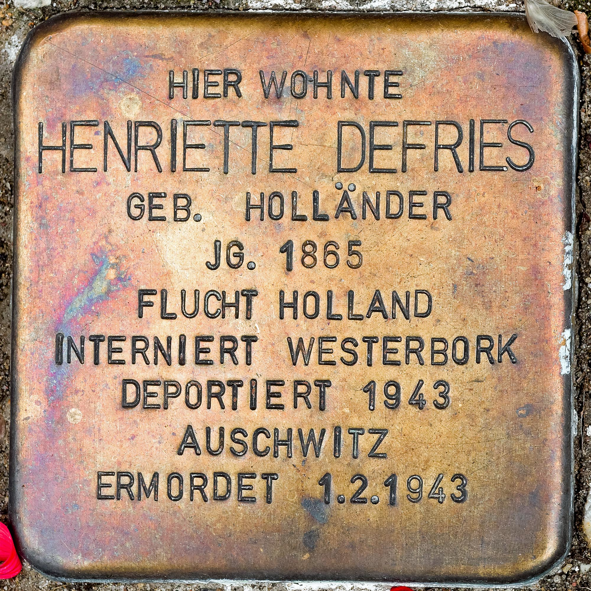 Stolperstein Defries, Henriette